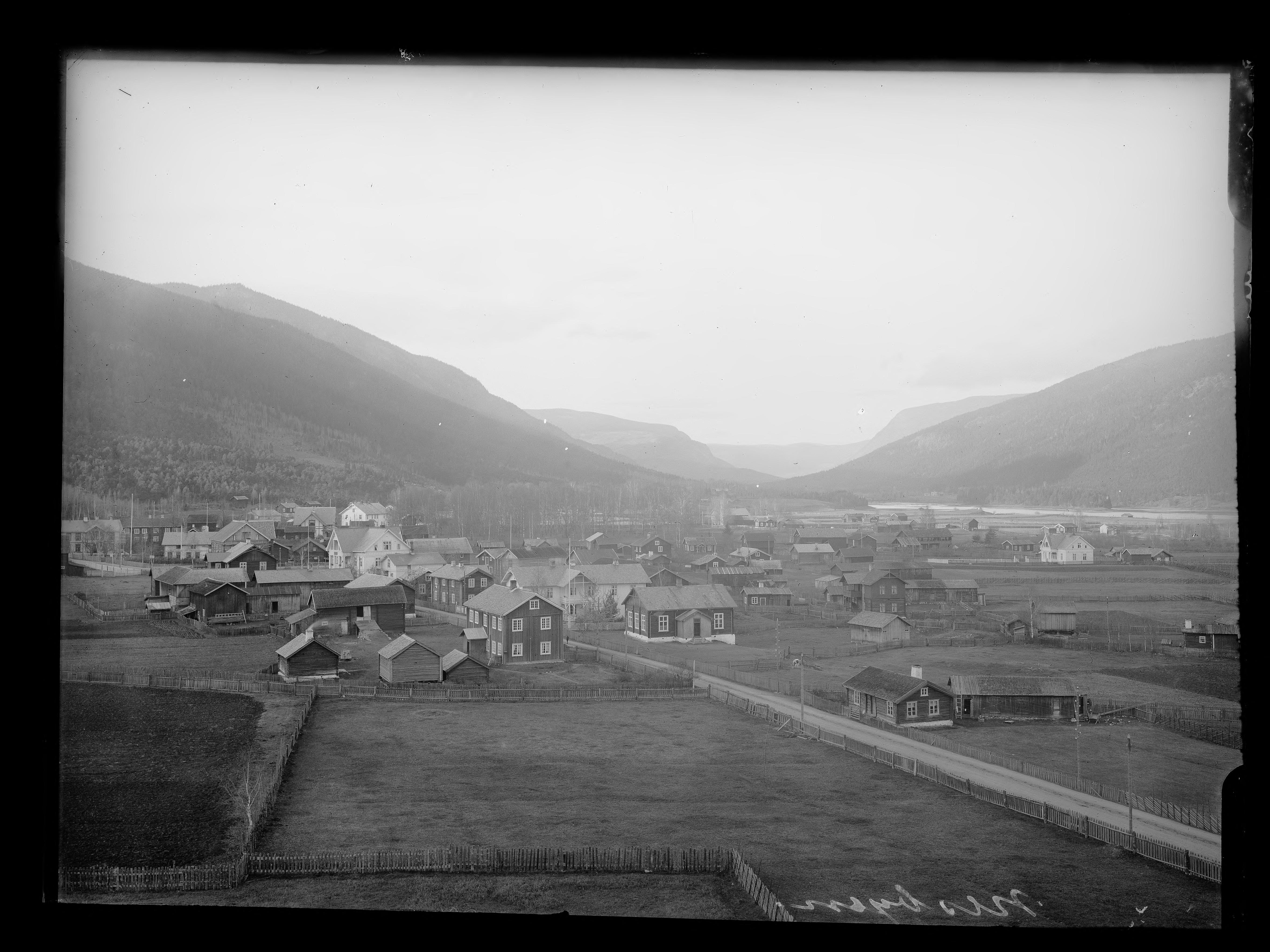 Bildet er hentet fra Nasjonalbibliotekets bildesamling. Anmerkninger til bildet var: Påskrift eske: Ness Hallingdal Påskrift negativ: Nesbyen Hallingdal,Nesbyen, Nes, Buskerud